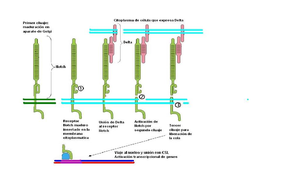 Ruta de señalización Notch.